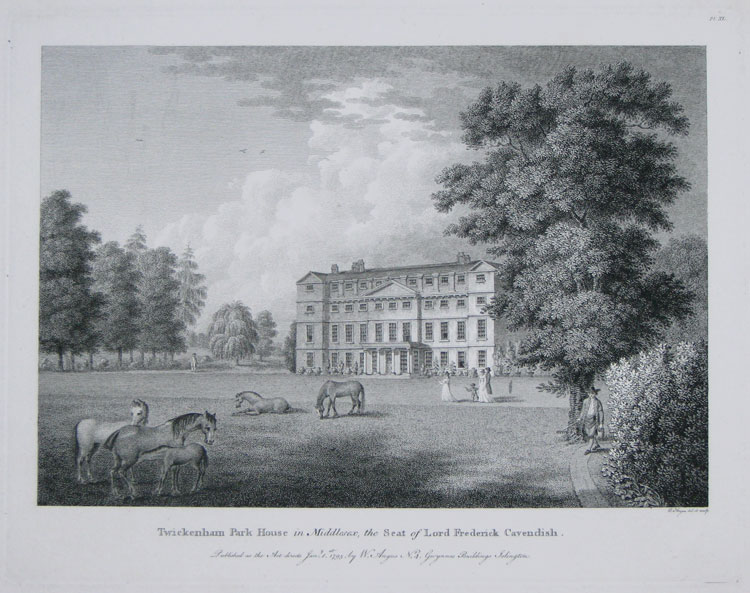 Twickenham Park House